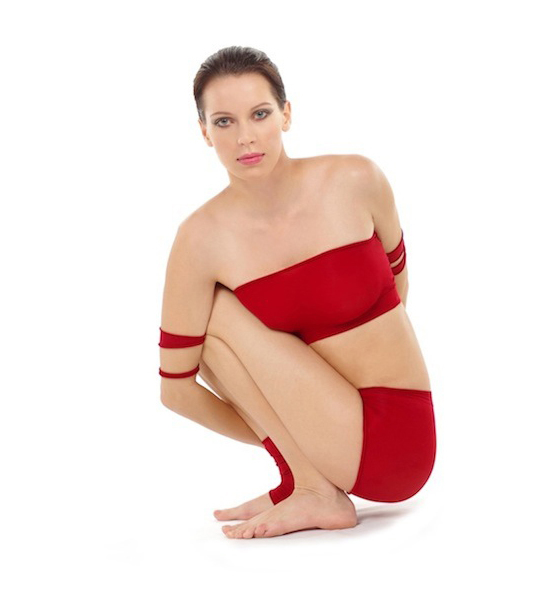 Pasasana by Nina Mel, Yoga Teacher